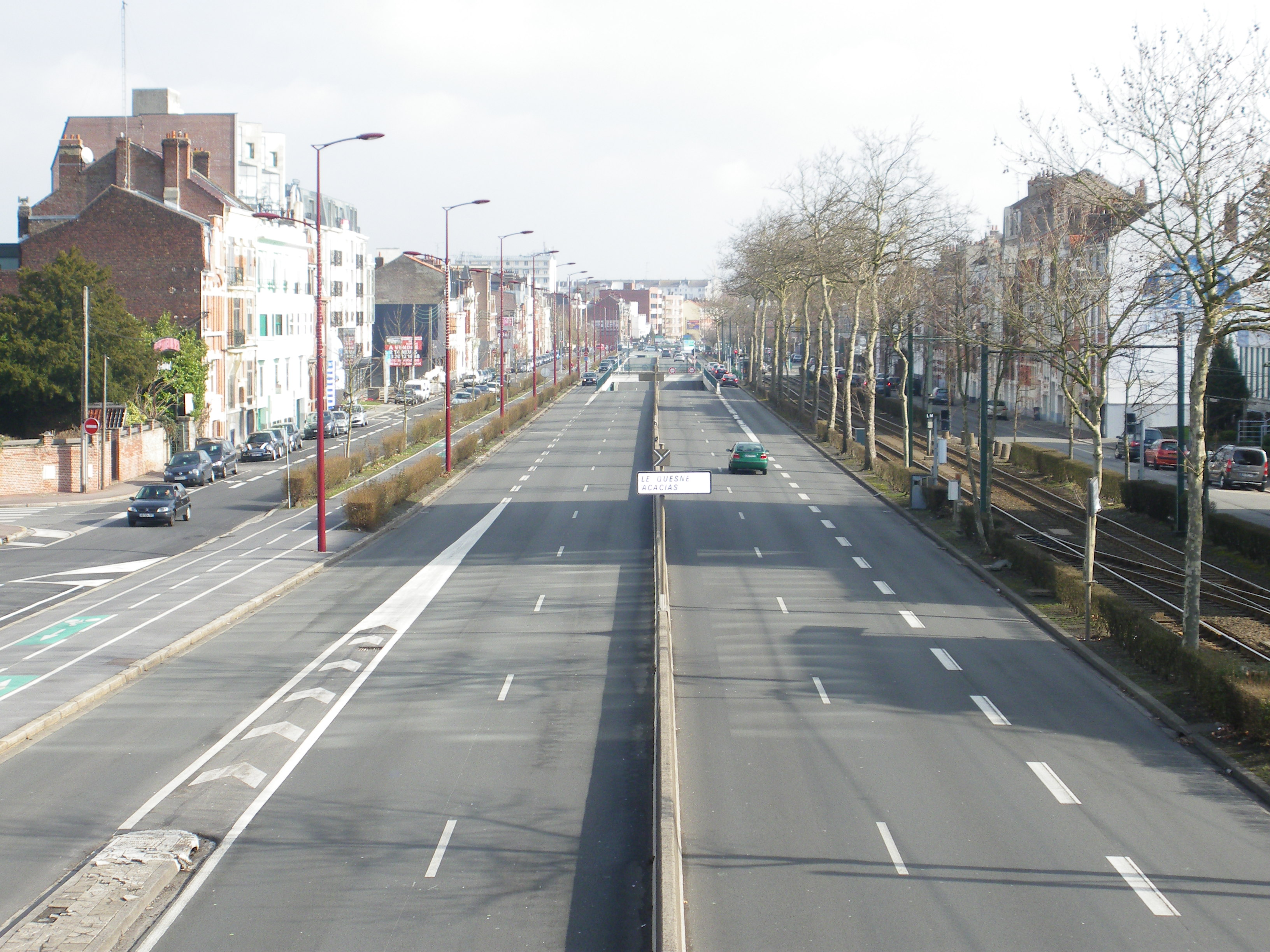 Vue du Grand Boulevard (Avenue de la République) de Lille-Roubaix-Tourcoing à hauteur de Marcq-en-Baroeul